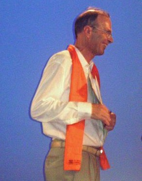 Peter Ulrich auf dem DEKT 2007 in Köln